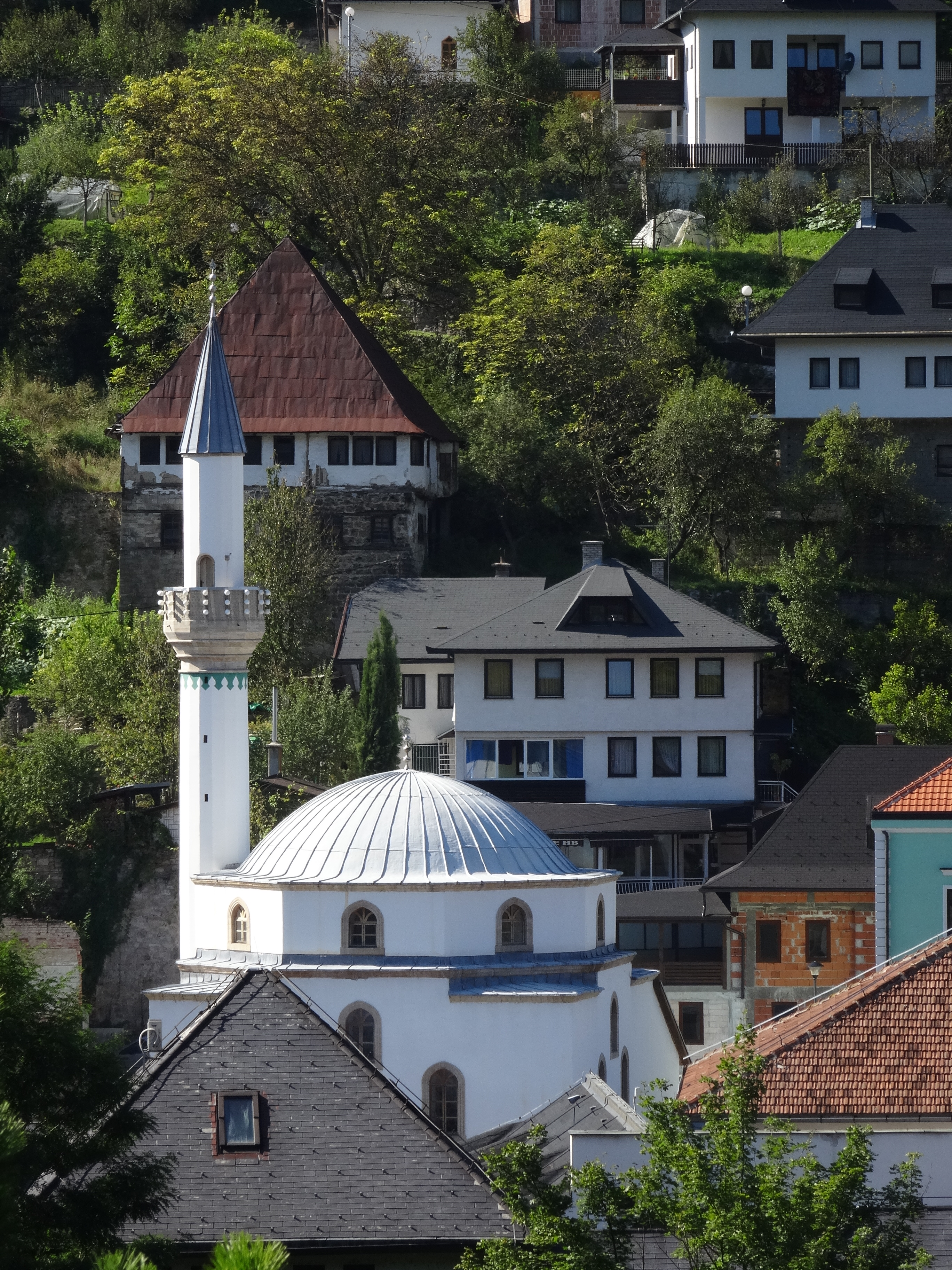 Blick von der Hauptstraße nach Banja Luka auf die Moschee